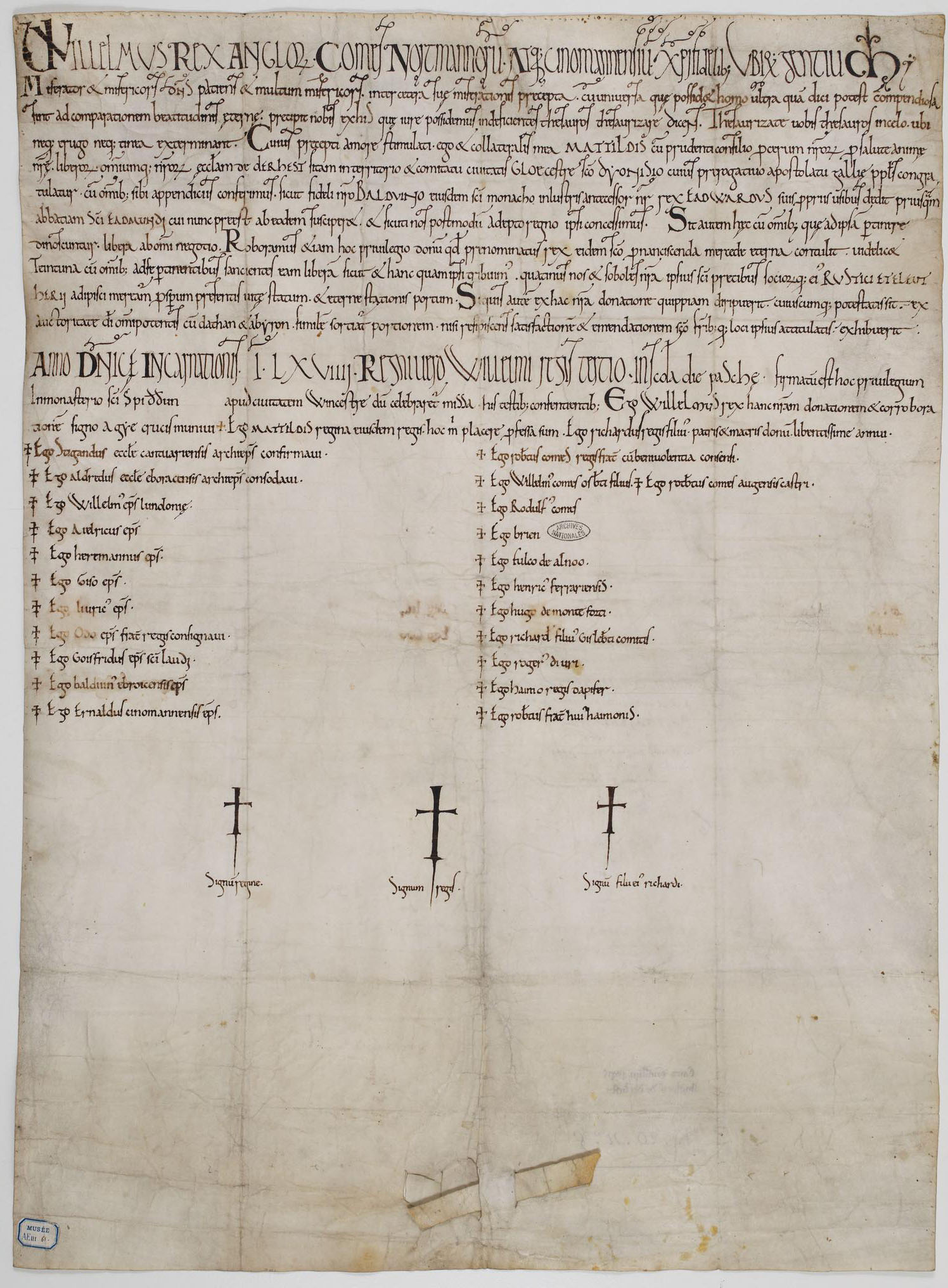 Donation par Guillaume le Conquérant à l'abbaye de Saint-Denis de l'église de Derhest, dans le comté de Gloucester. Acte en latin, daté du 14 avril 1069.